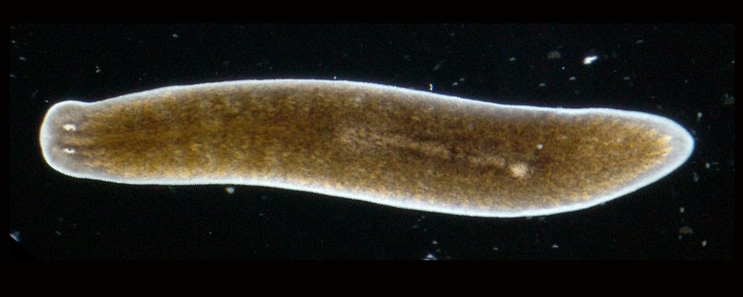 Planaria torva